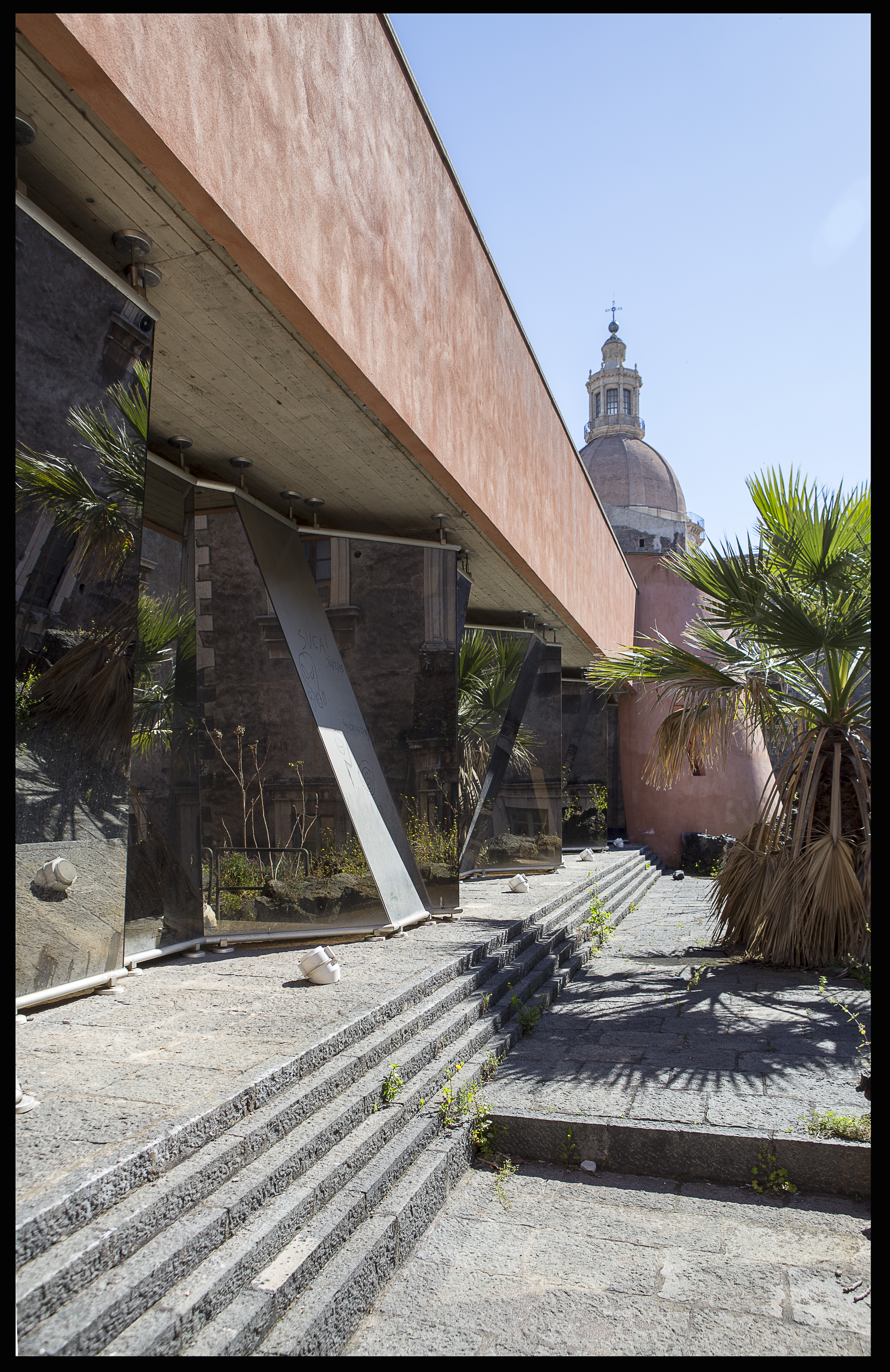 Centrale termica, giardino dei Novizi - monastero di San Nicolà l'Arena (Giancarlo De Carlo)